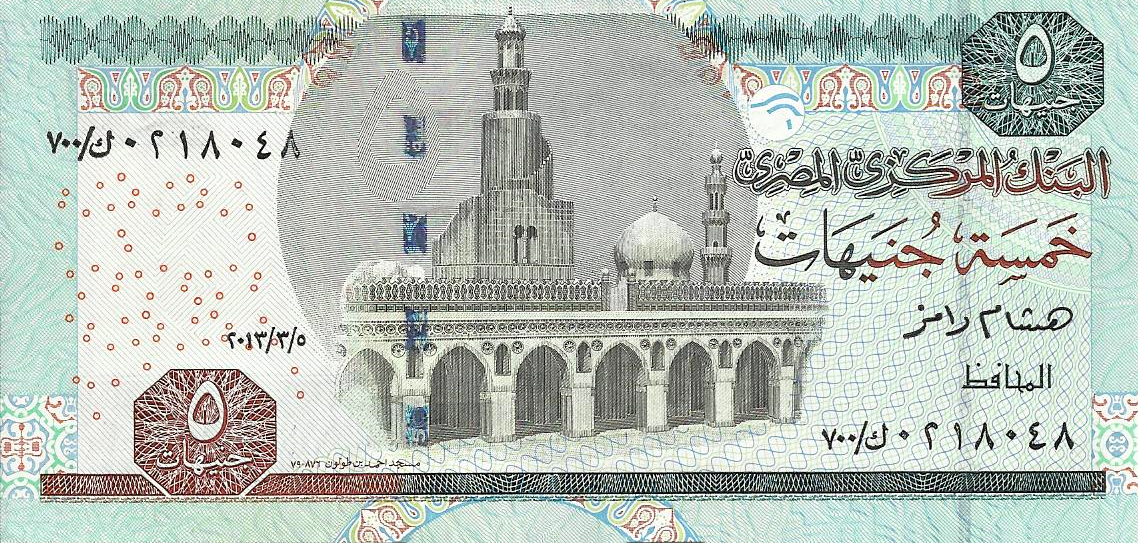 عملة ورقية مصرية من فئة 5 جنيه.